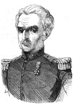 Le général Courtais.